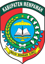 Lambang kabupaten Mempawah